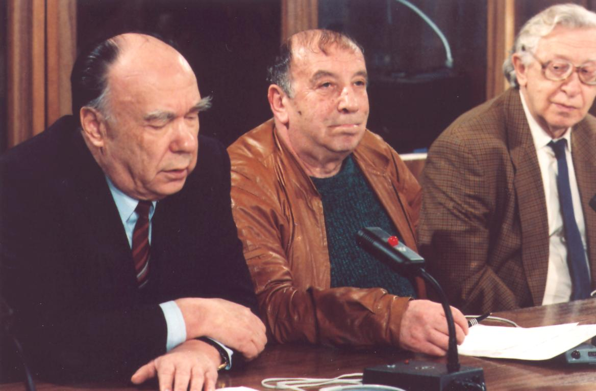 Международная Леонардо-премия